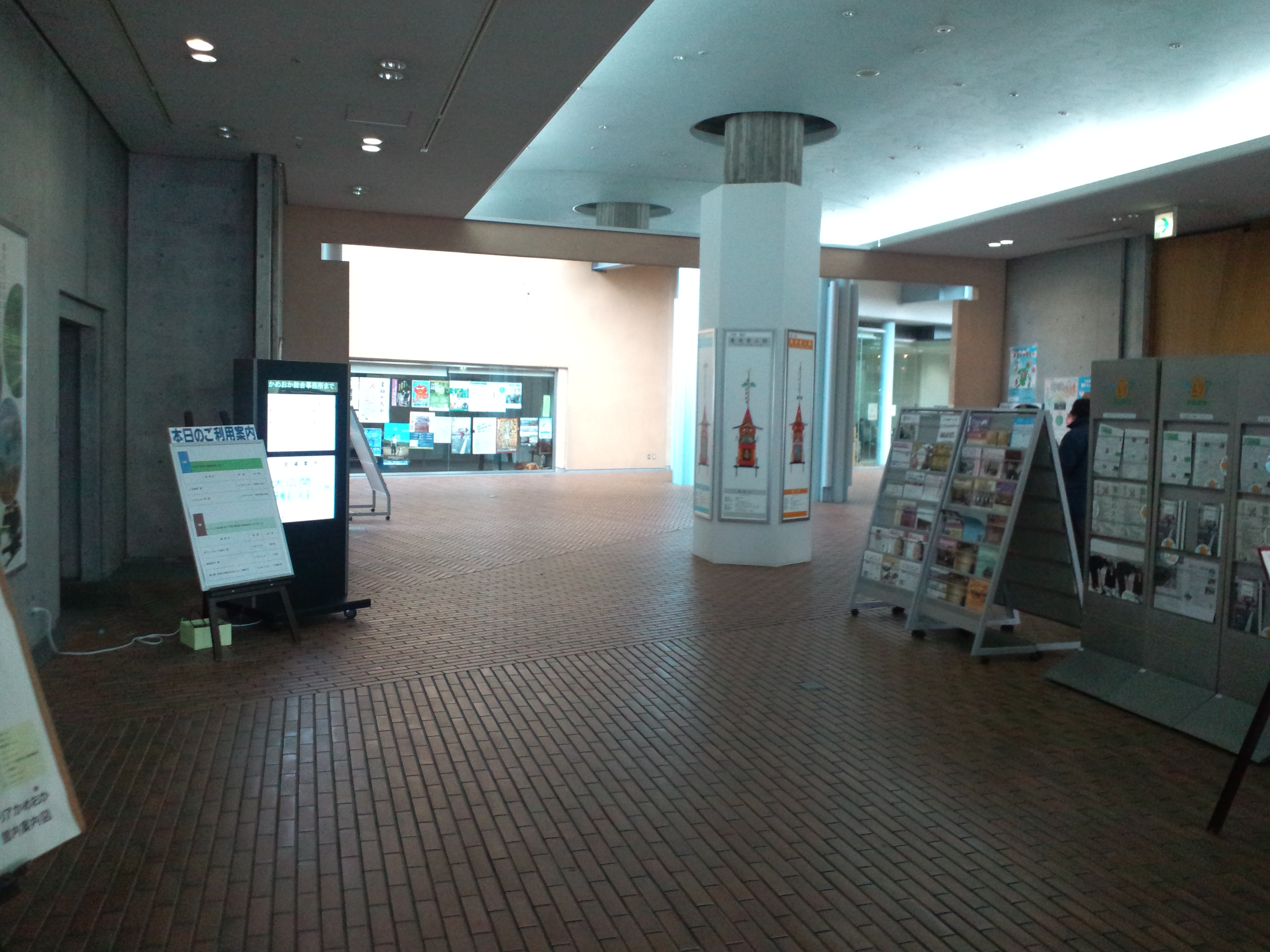 道の駅ガレリアかめおか 内観